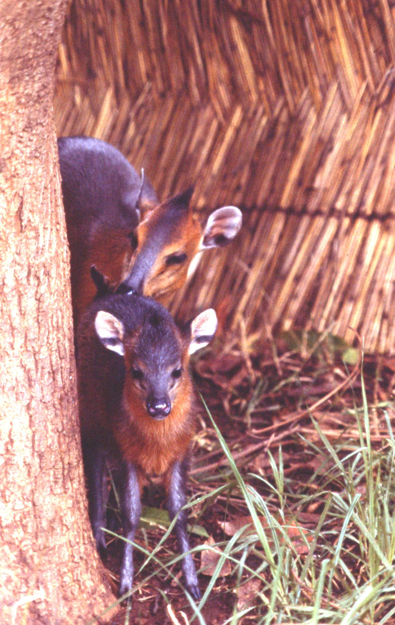 Céphalophe Rufilatus et son petit